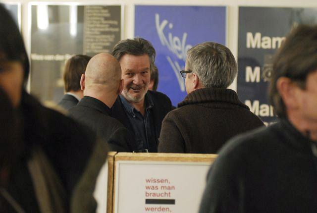 Vernissage der Retrospektive: „Rolf Müller – Zeichensetzer, Systemdenker, Geschichtenerzähler“ am 12.02.2009 in der Halle 27 (Kochan & Partner) Hirschgartenallee 27, 80639 München. Anlässlich der Verleihung des Designpreises der Stadt München organisierte die Typografische Gesellschaft München die erste Retrospektive zum Werk Rolf Müllers. Im Bild: Rolf Müller